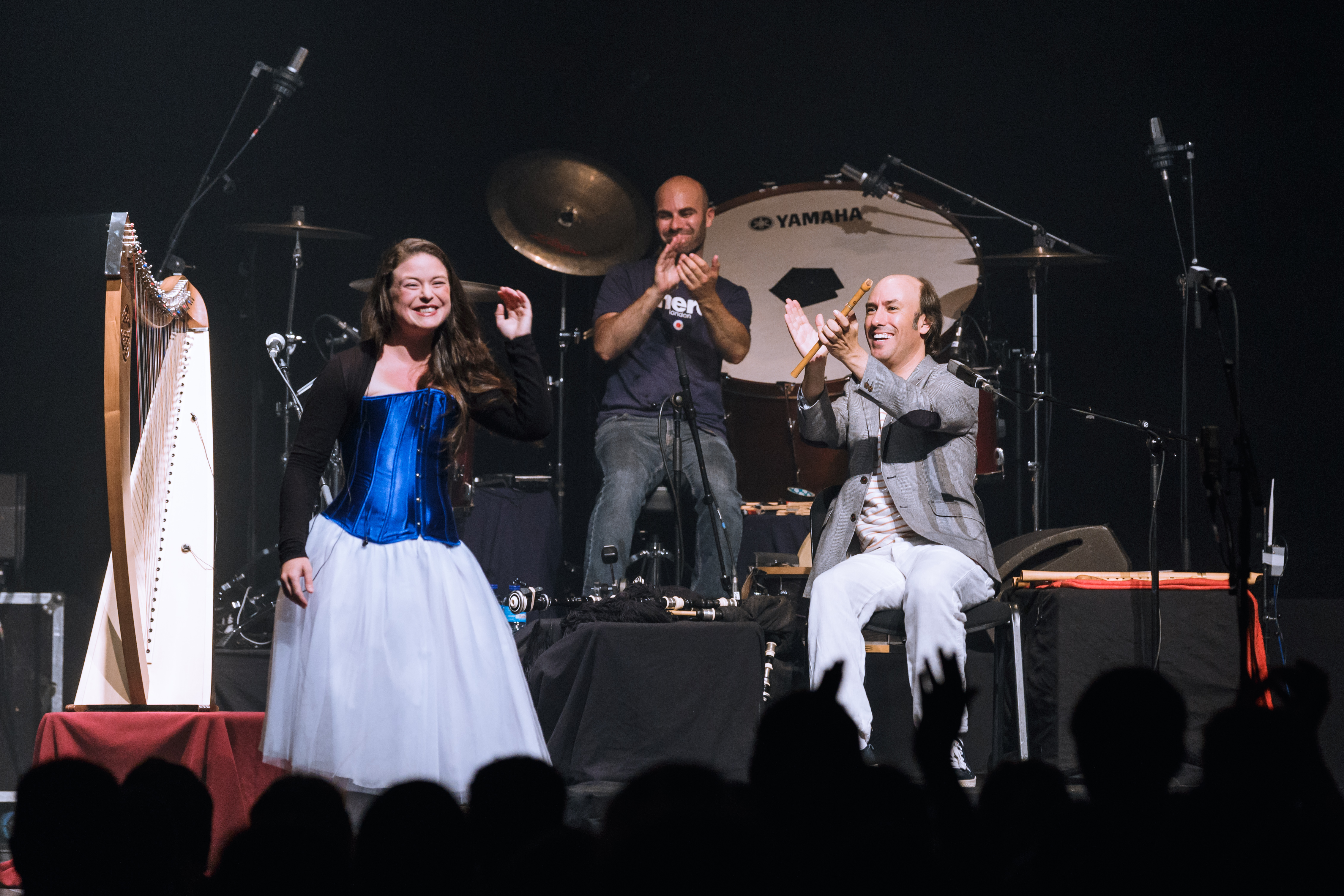 Carlos Núñez en concert à Quimper dans le cadre du festival de Cornouaille le 20 juillet 2017.